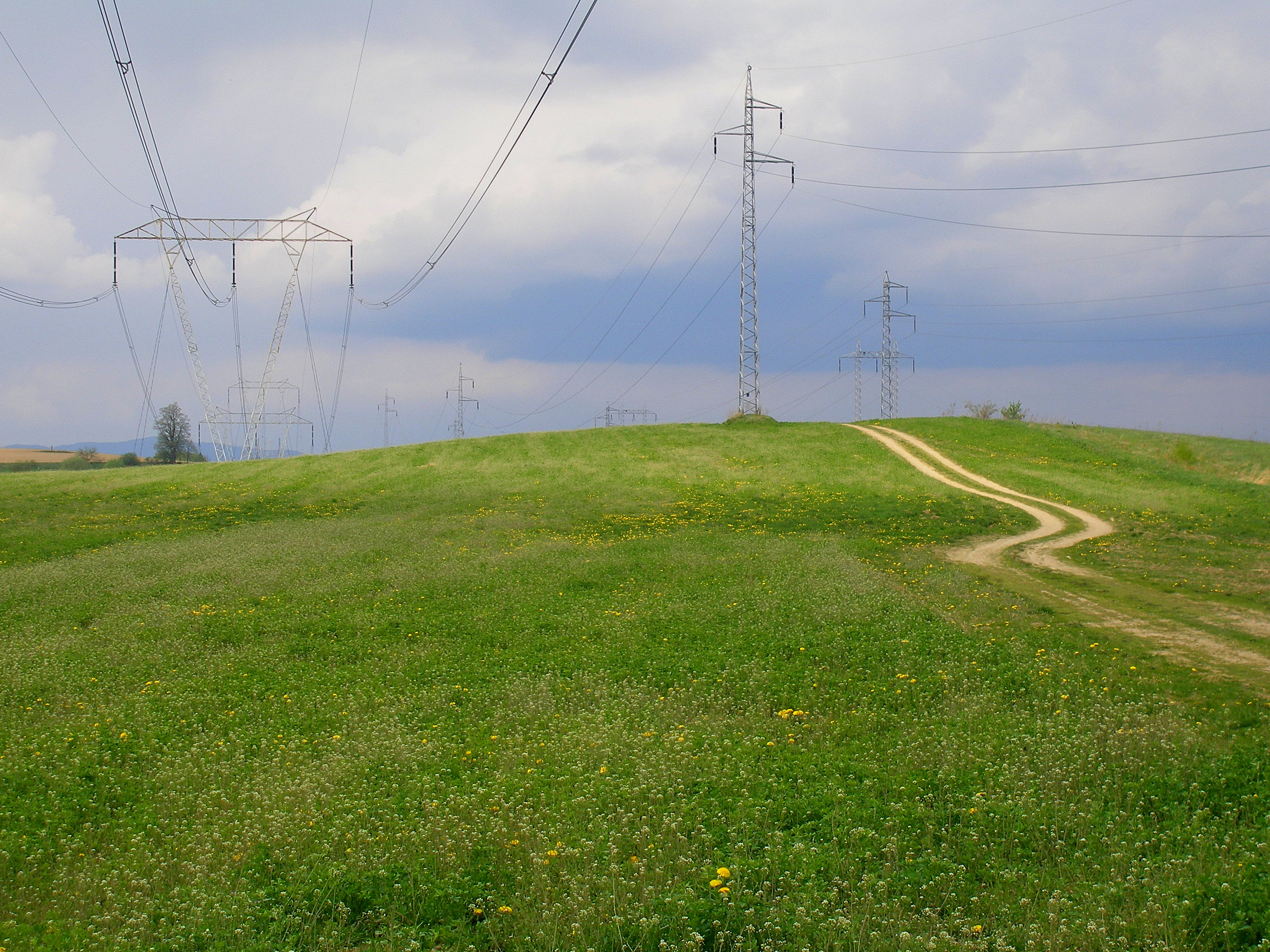 Okolie obce Klenov okres Prešov.